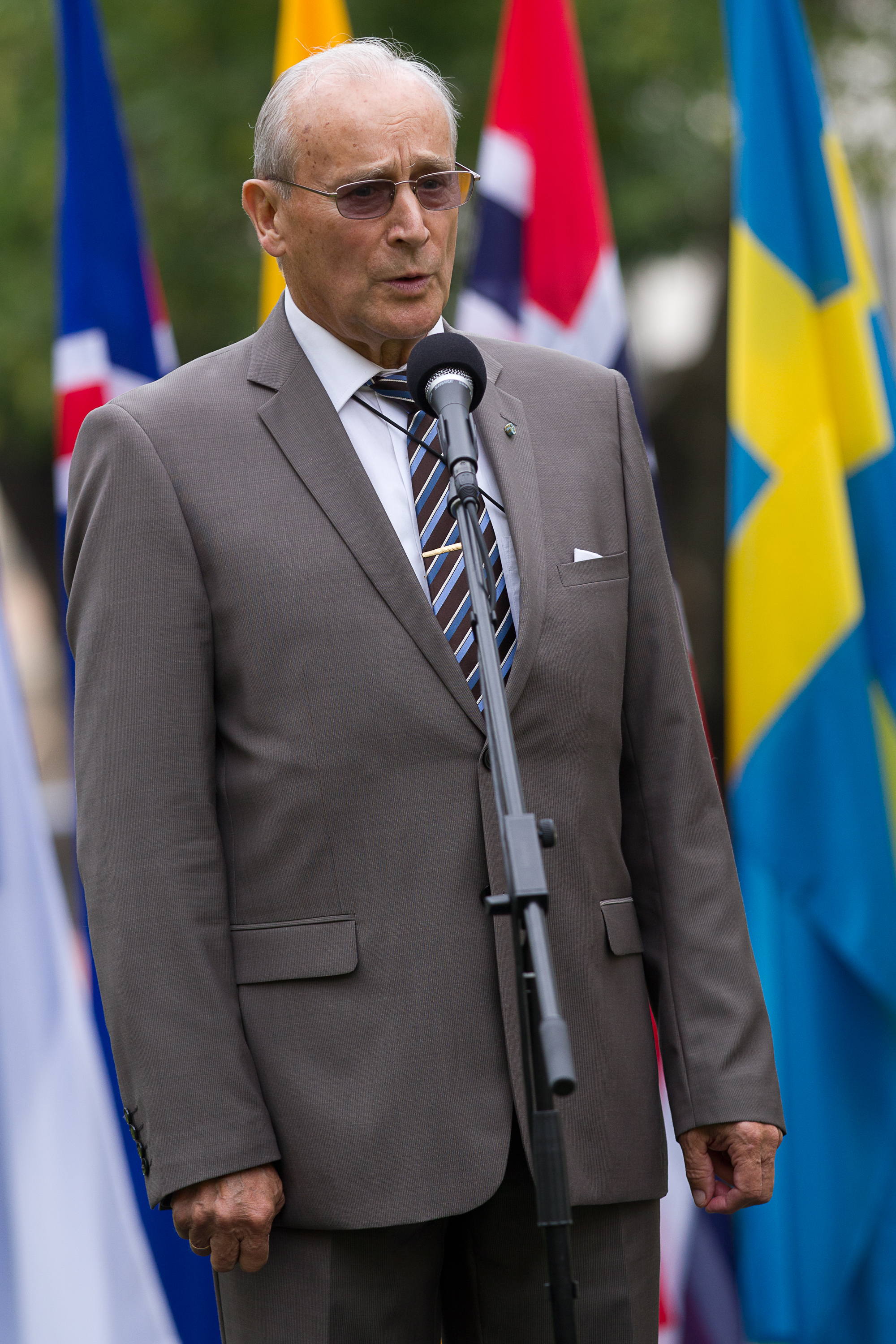 2011.gada 21.augusts. Baltijas un Ziemeļvalstu parlamentu priekšsēdētāji kopā ar Augstākās padomes deputātiem stāda kociņus Jēkaba laukumā pie Saeimas nama par godu Latvijas Republikas valstiskās neatkarības atjaunošanas 20.gadadienai. Attēlā: 4.maija deklarācijas kluba dalībnieks Georgs Andrejevs. Foto: Ernests Dinka, Saeimas Kanceleja